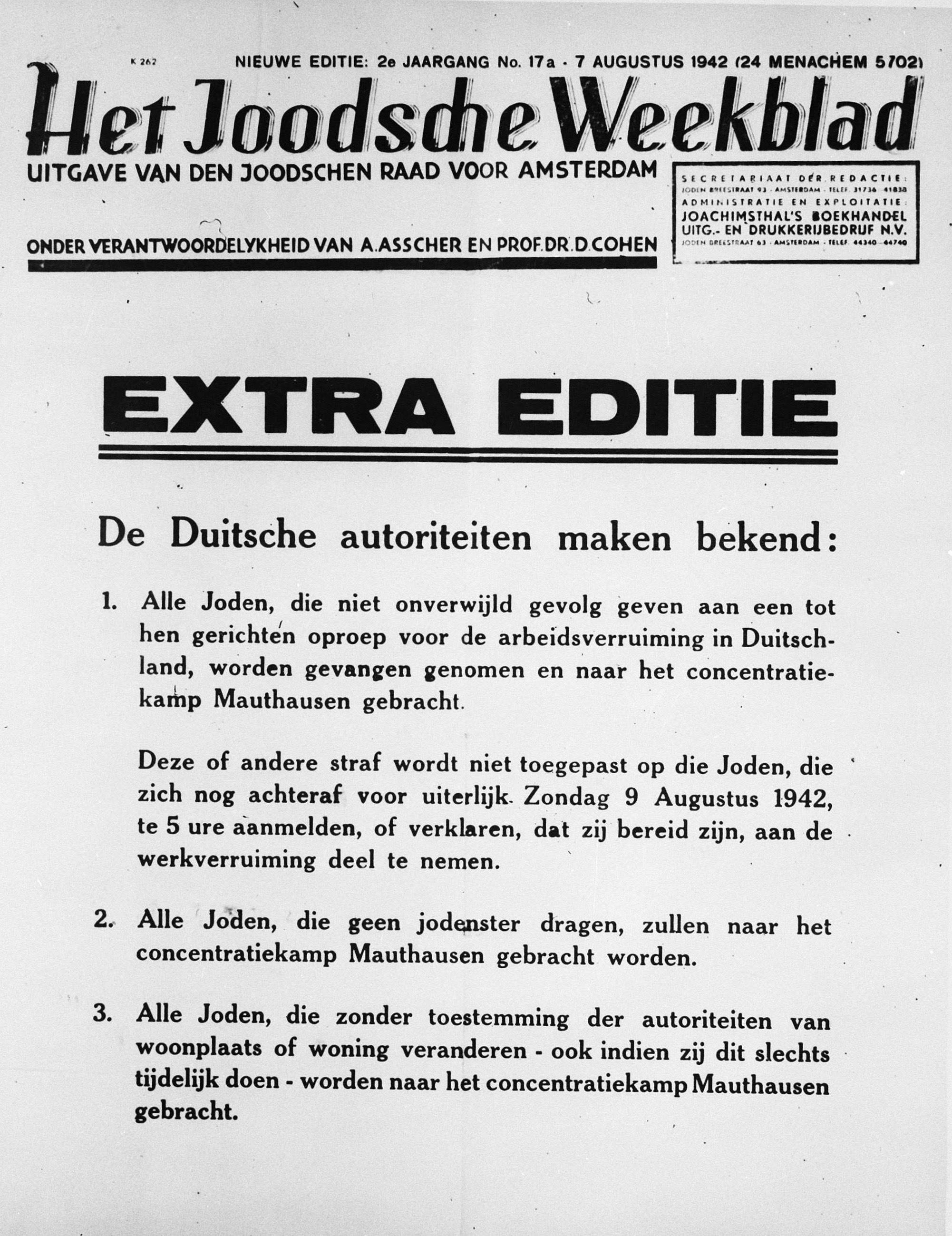 Het Joodsche Weekblad extra editie 7 augustus 1942